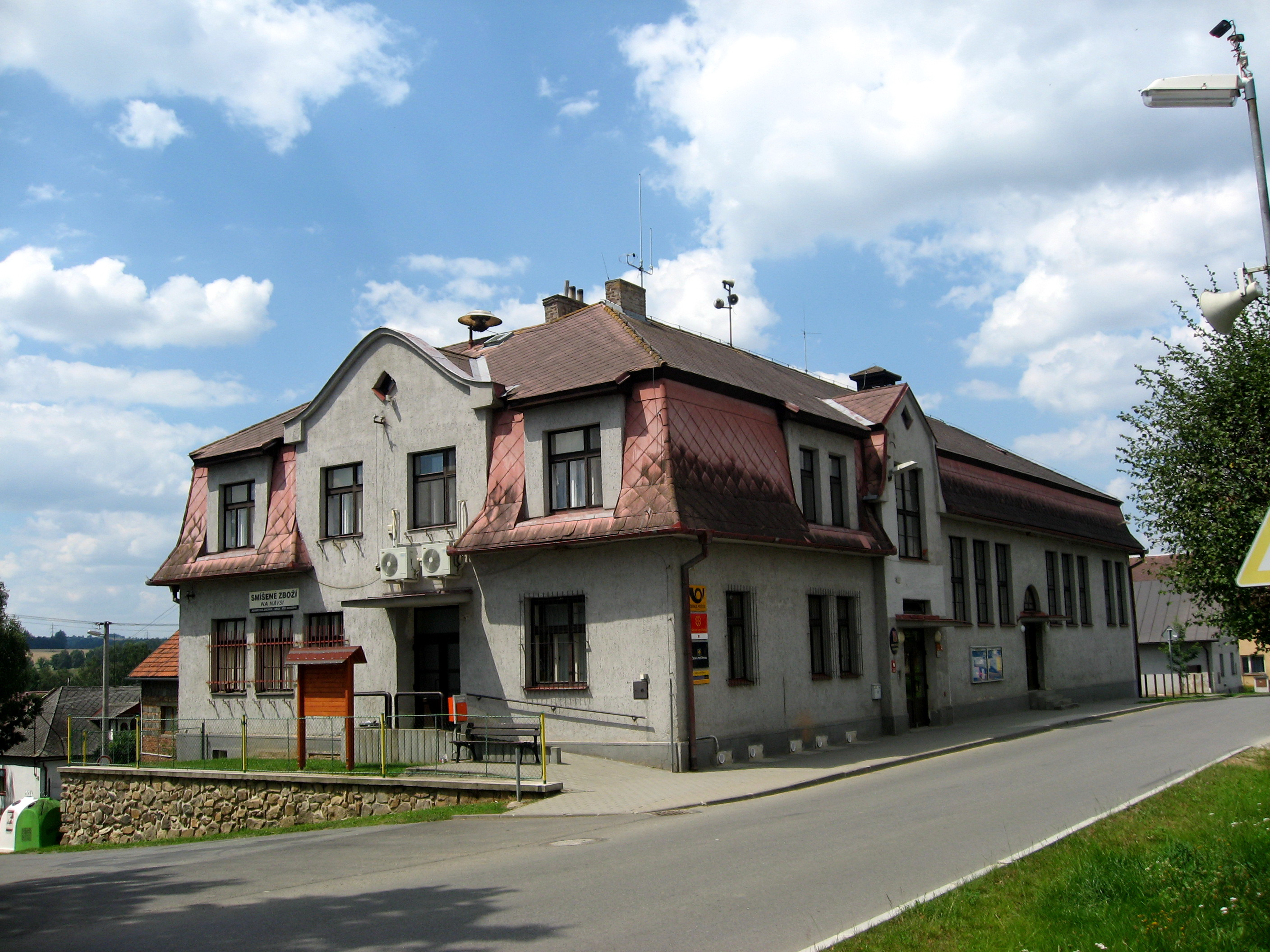 Šlapanov, obecní úřad, pošta, smíšené zboží